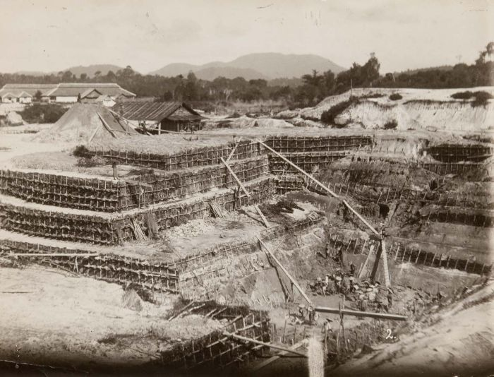 Foto. Op de achtergrond is het hospitaal te zien. Een mijn van de Singkep Tin Maatschappij, Dabo